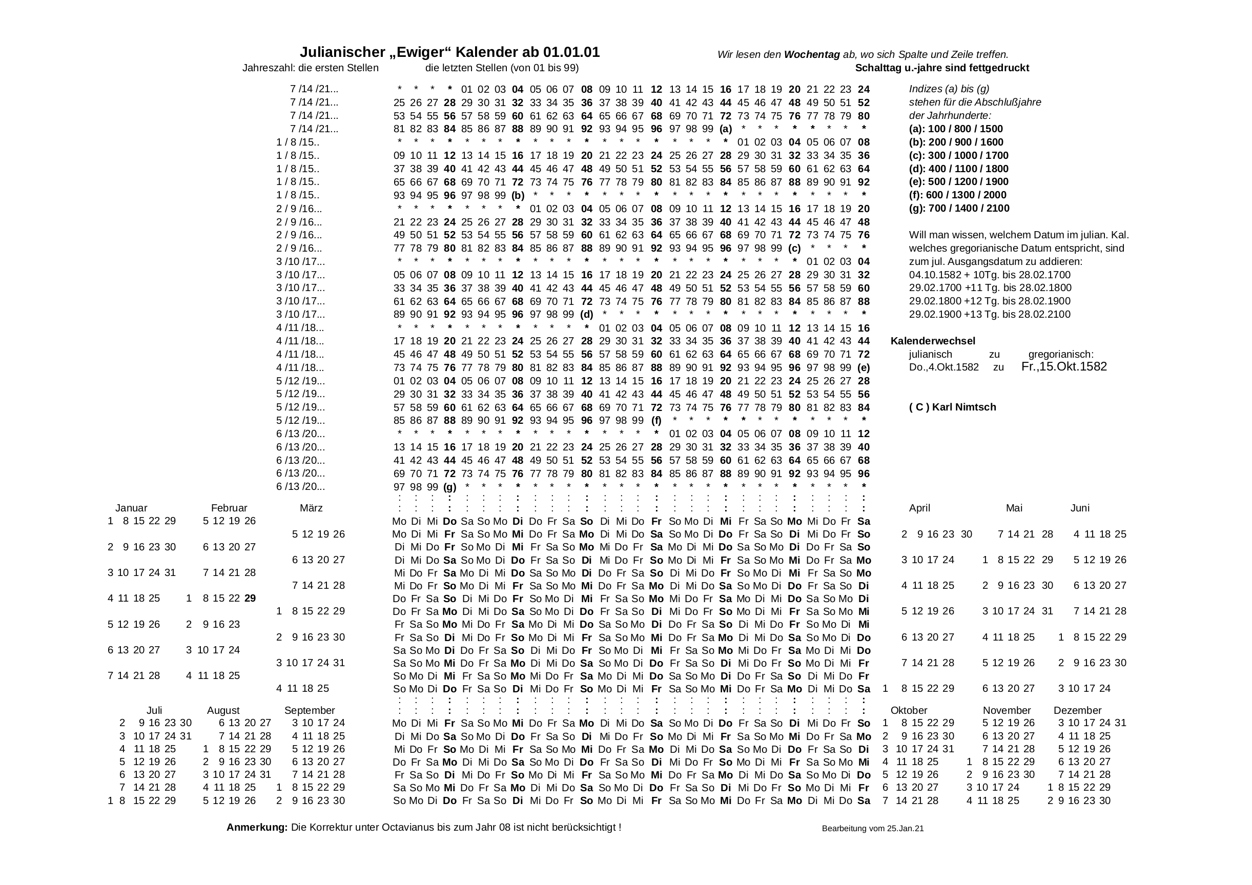 Kalender julianisch ab 1.Januar des Jahres 1 n.Chr. (Ohne Berücksichtigung der Augusteischen Korrektur bis zum Jahr 8 n.Chr., (mit Angabe der Umrechnungsmöglichkeit auf gregorianisch) und Angabe der Jahrhunderte)